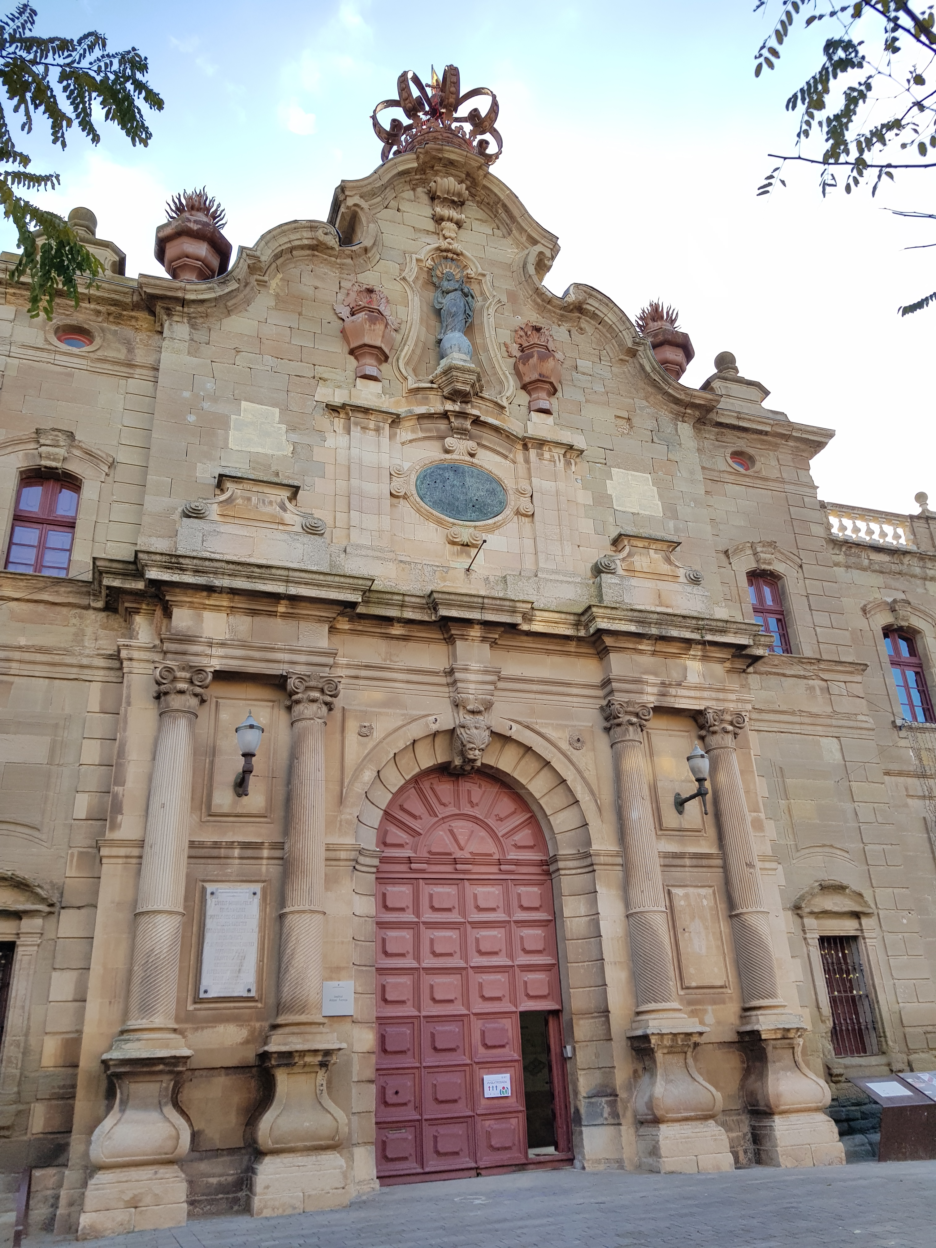 Universidad de Cervera, capital de la Segarra (Lérida)